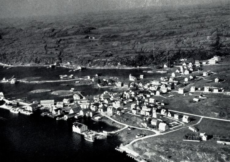 Rørvik i Vikna.